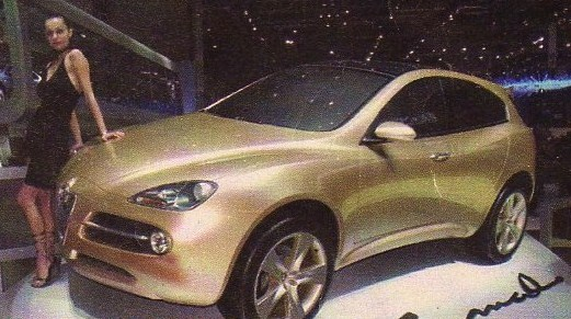 un'Alfa Romeo Kamal concept